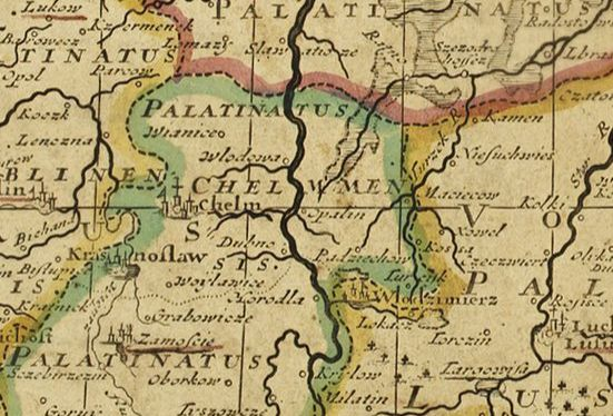 Ziemia chełmska (Palatinatus chelmensis) na mapie "Regni Poloniae et Ducatus Lithuaniae [...] descriptio", Amsterdam 1700